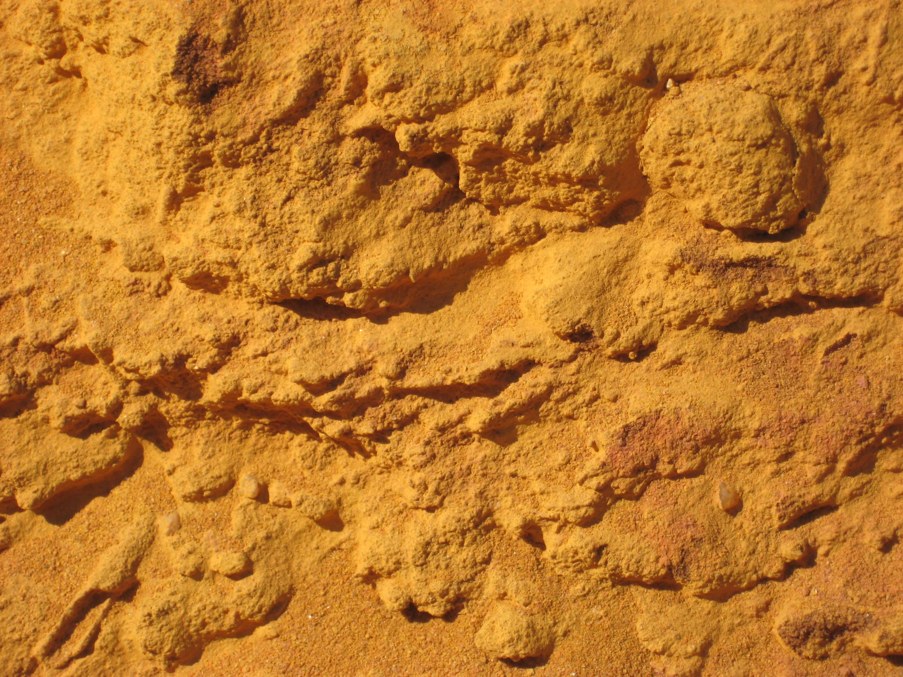 Ockergestein in einem Ockerbruch bei Roussillon